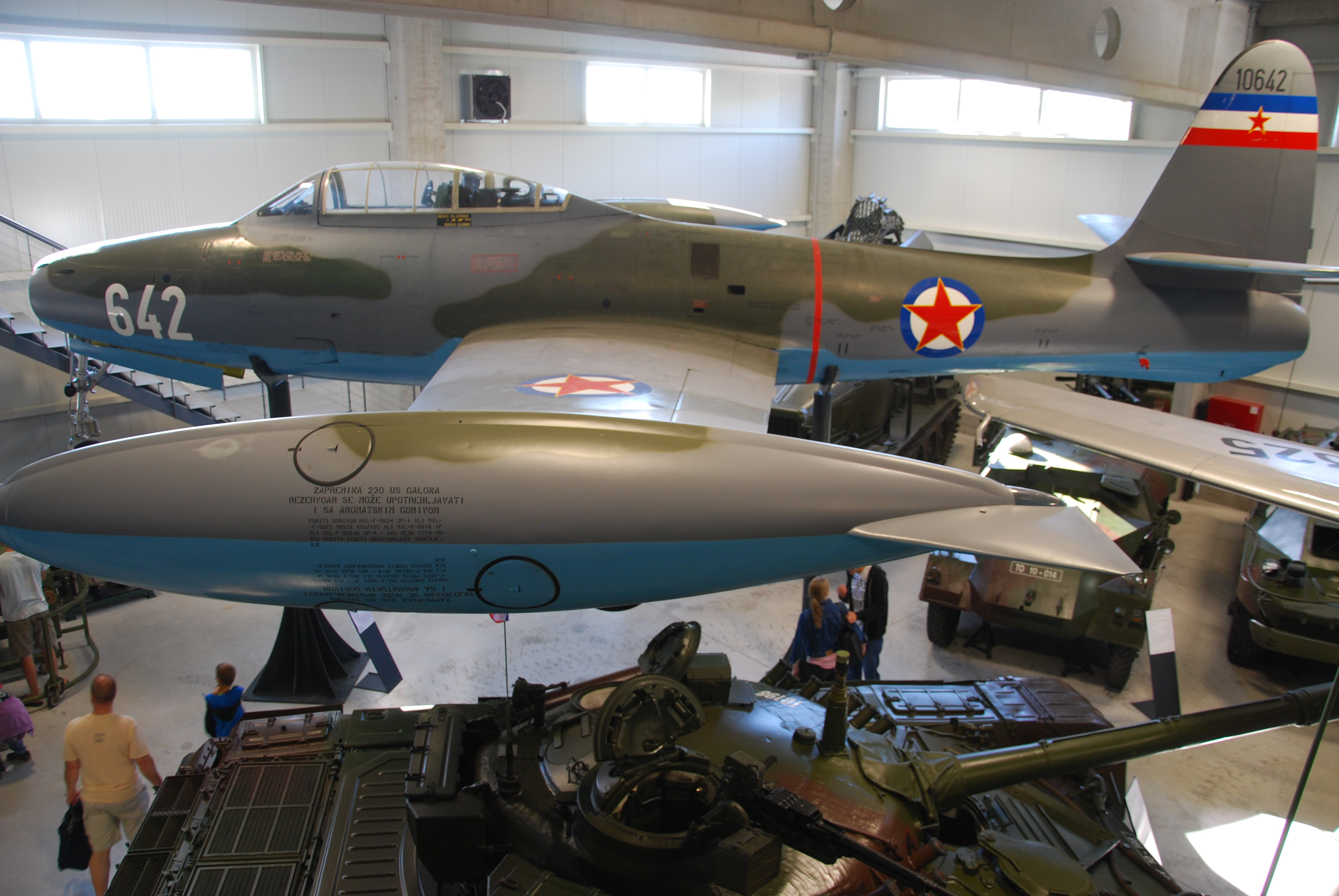 Letalo F-84G Thunderjet v Parku vojaške zgodovine Pivka. Letalo je Jugoslavija dobila kot vojaško pomoč zahodnih držav v času hladne vojne.